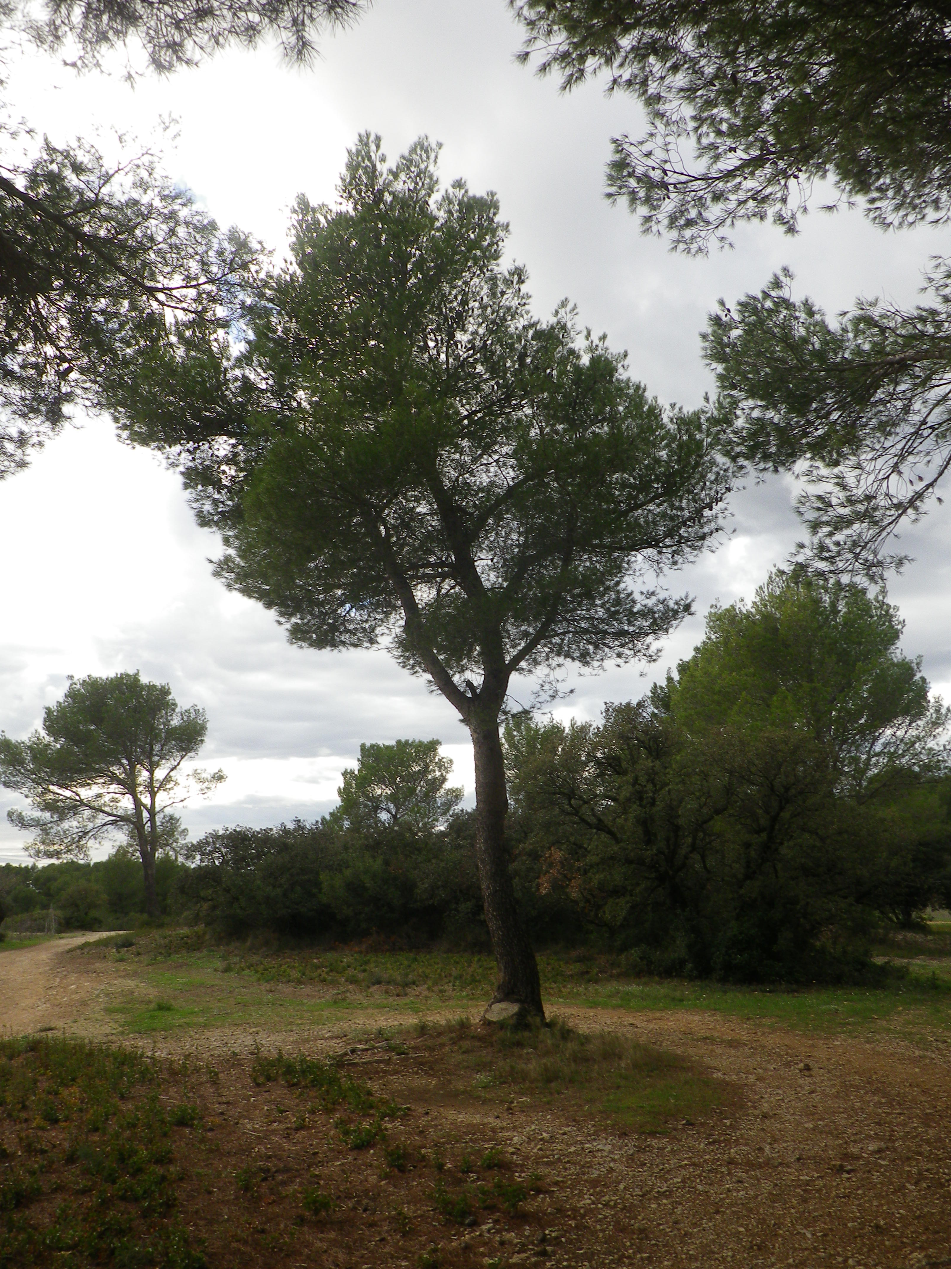 Arbre en forêt